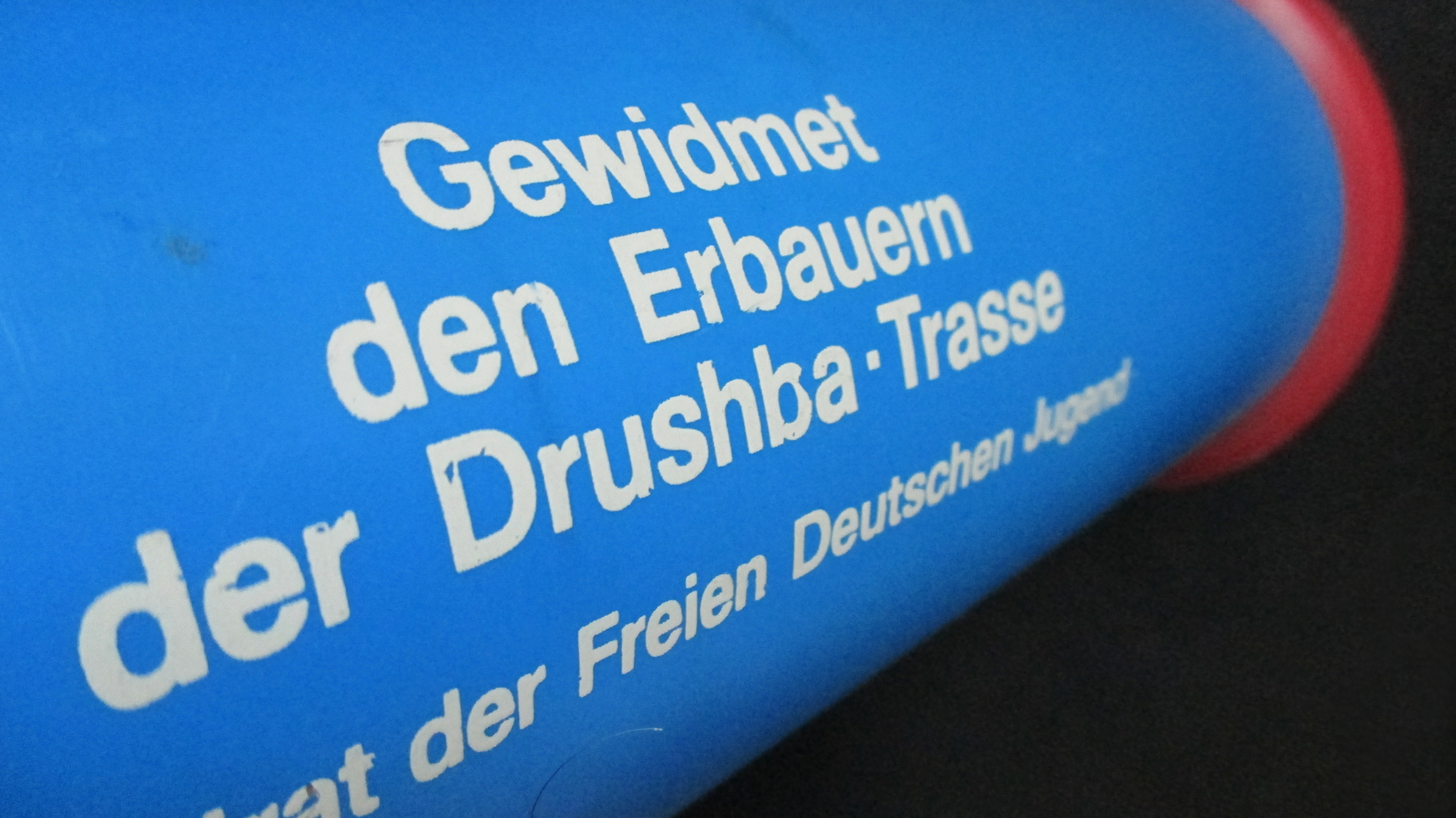 Ehrengeschenk des Zentraltat der Freien Deutschen Jugend_für die_Erbauer der Drushba-Trasse